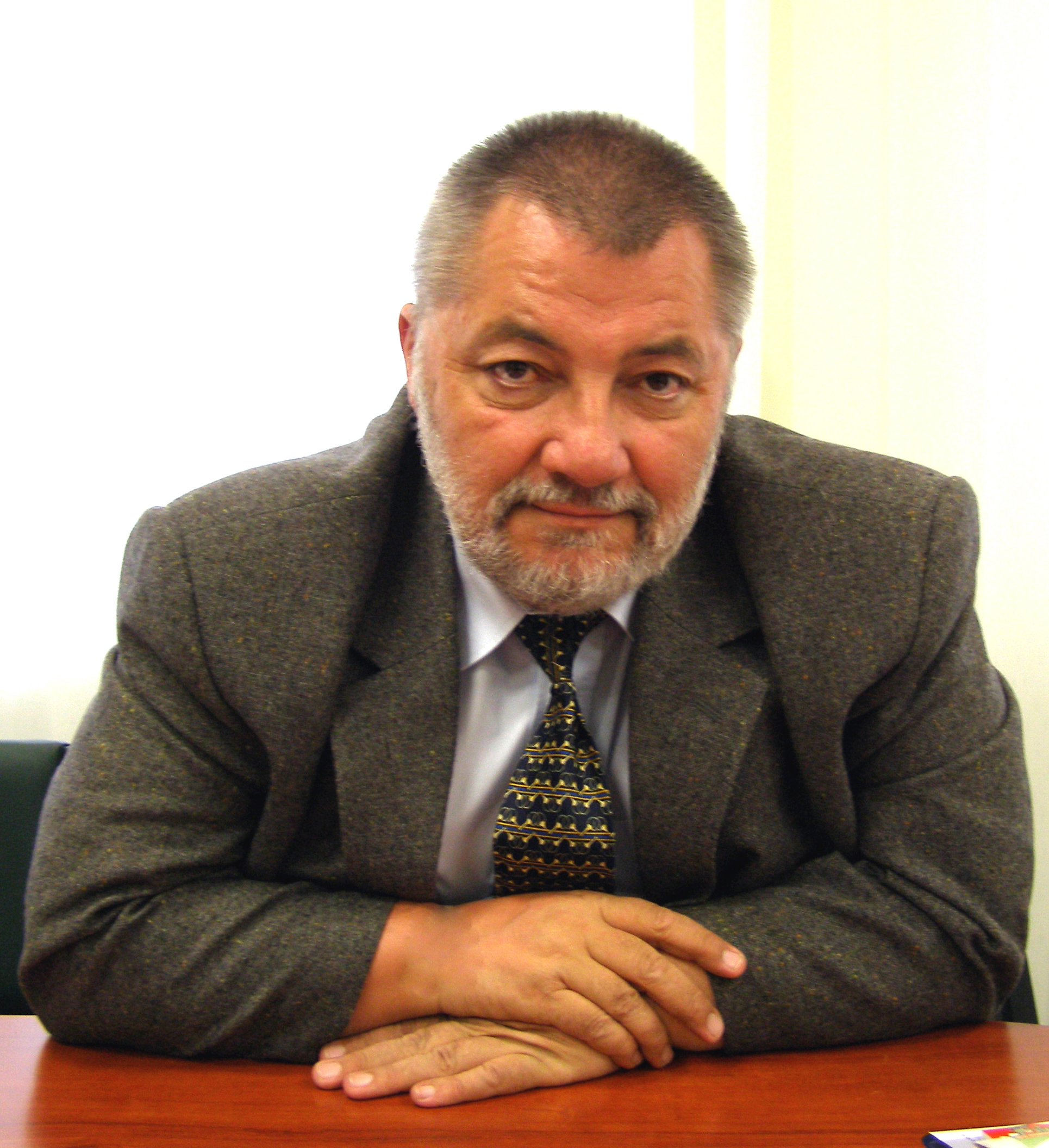 Zdjęcie Zbigniewa K. Krzywickiego.